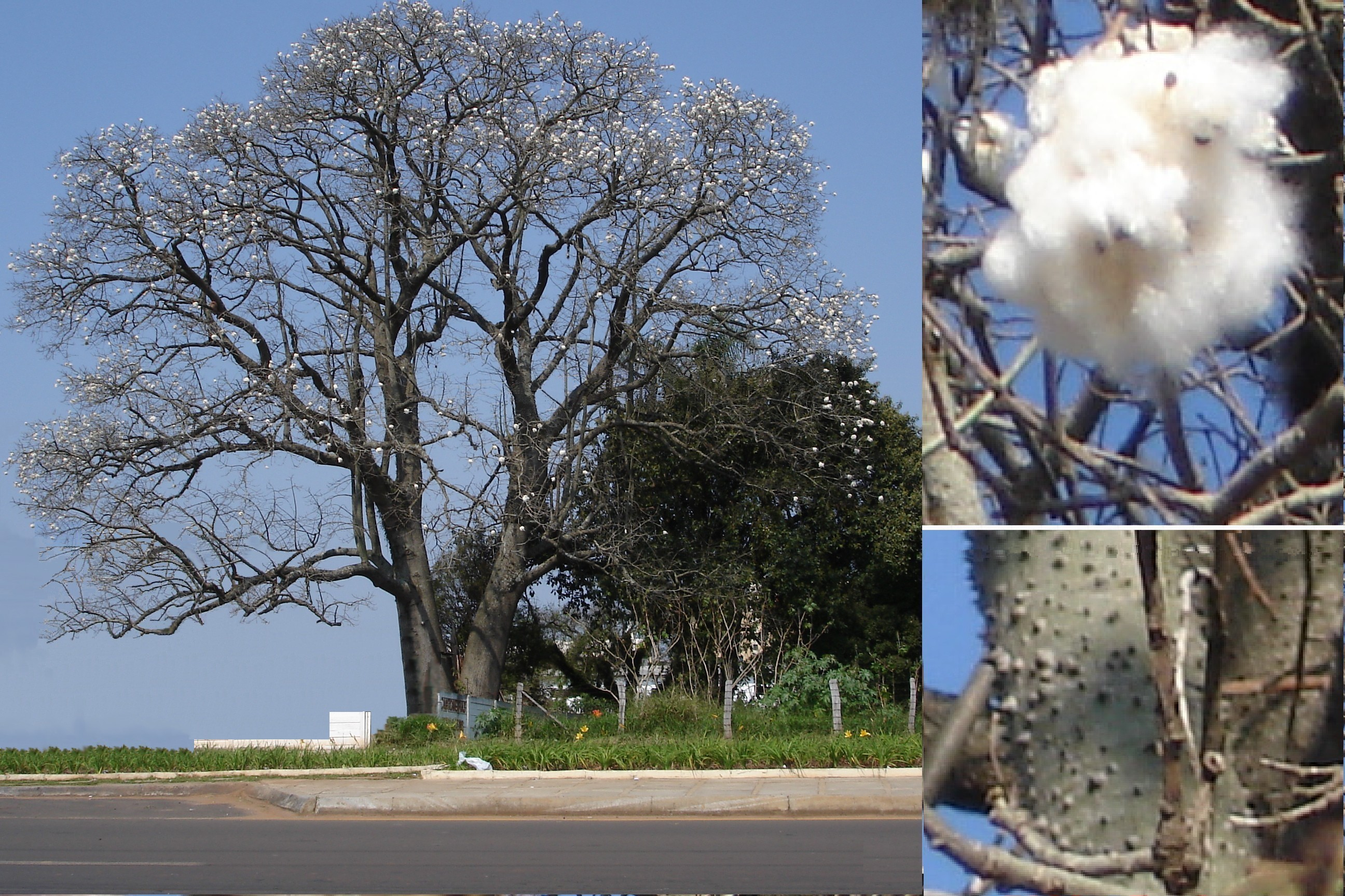 Paineira (Chorisia) c/ montagem aspectos das flores (painas) e casca.